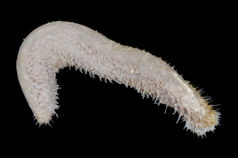 Une holothurie Holothuria discrepans.